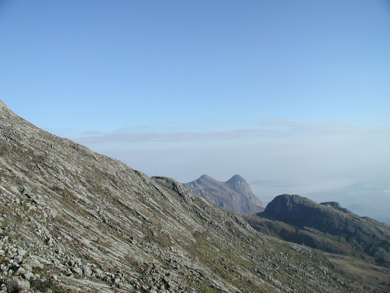 Sapitwa Peak, Mount Mulanje, Malawi